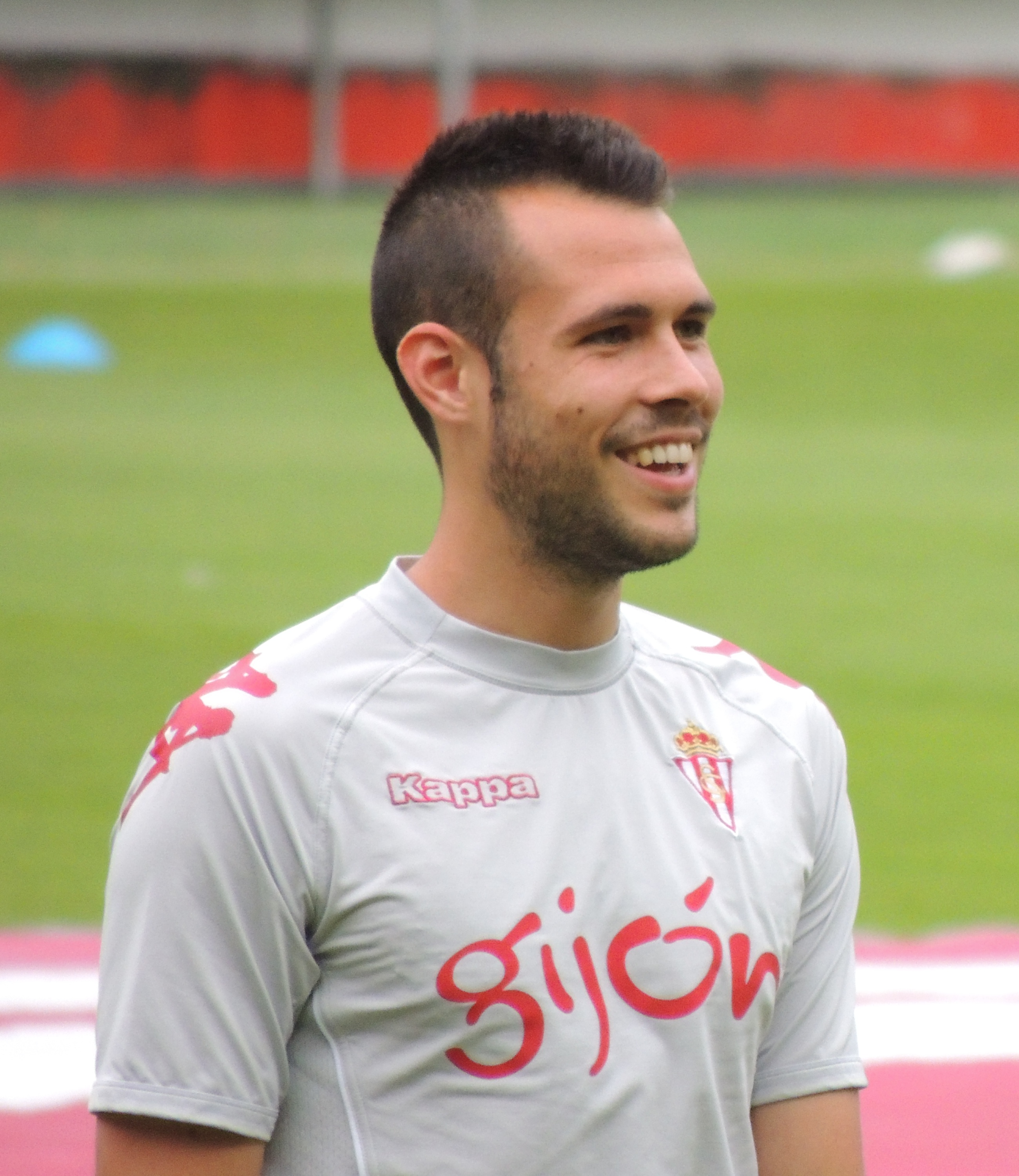 Calentamiento previo a partido contra UD Las Palmas en El Molinón.